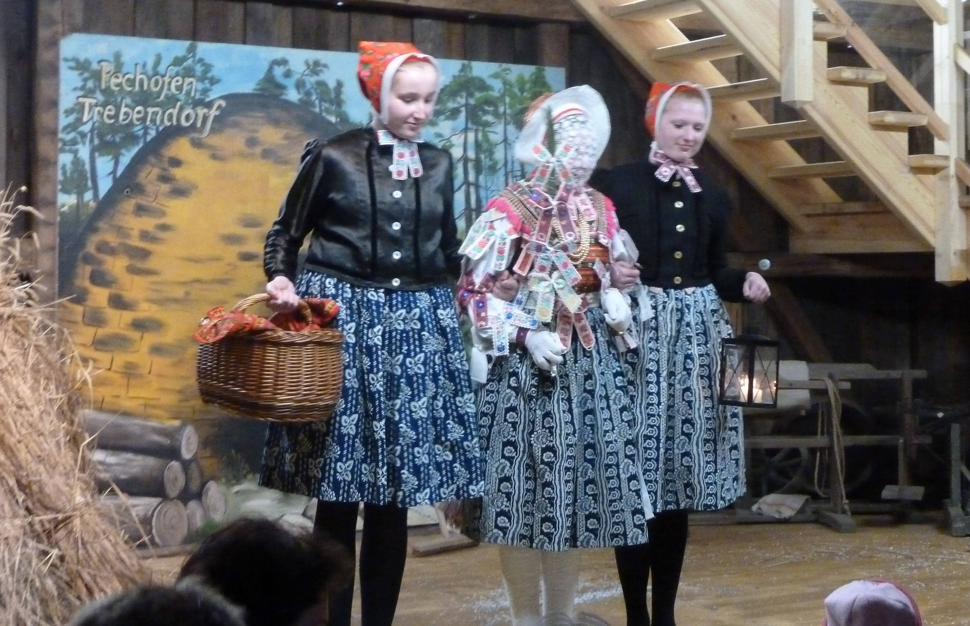 Das Trebendorfer Dźěćetko (Bescherkind) war auf dem Schuster-Hof zu Gast. Hornjoserbsce: Dźěćetko w Trjebinje